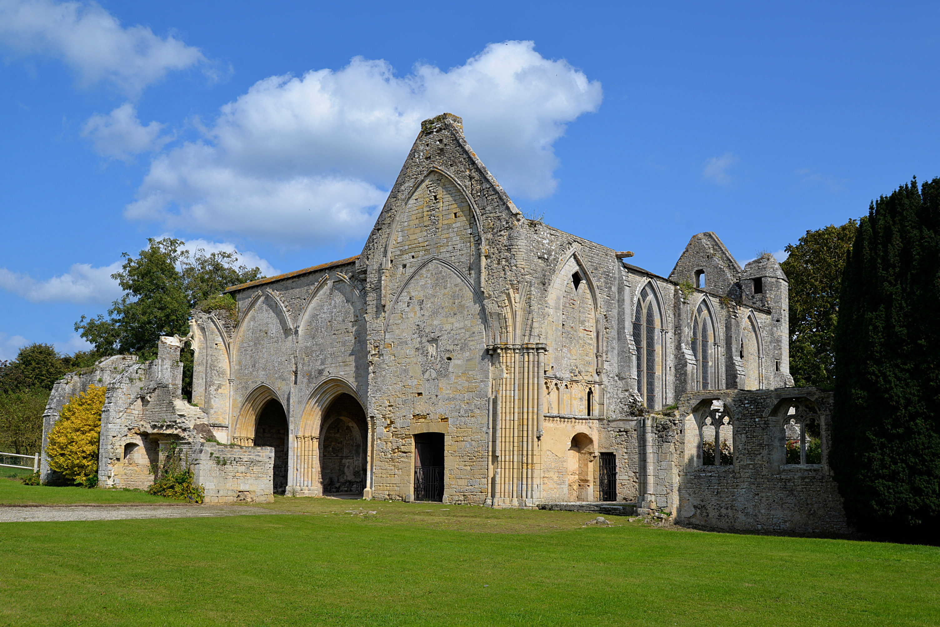 Longues-sur-Mer (Calvados)